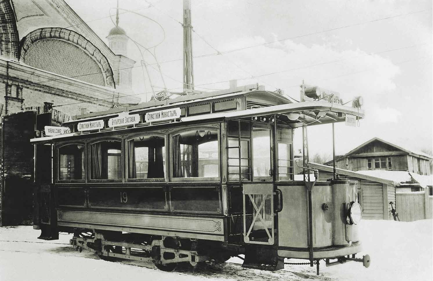 Пуск первого московского электрического трамвая, 1899 г. Описание в источнике: «Один из первых московских трамваев – вагон за номером 19. Первую партию, начавшую движение 7 апреля 1899 года в Москве, закупили в Германии у фирмы «Сименс и Гальске»